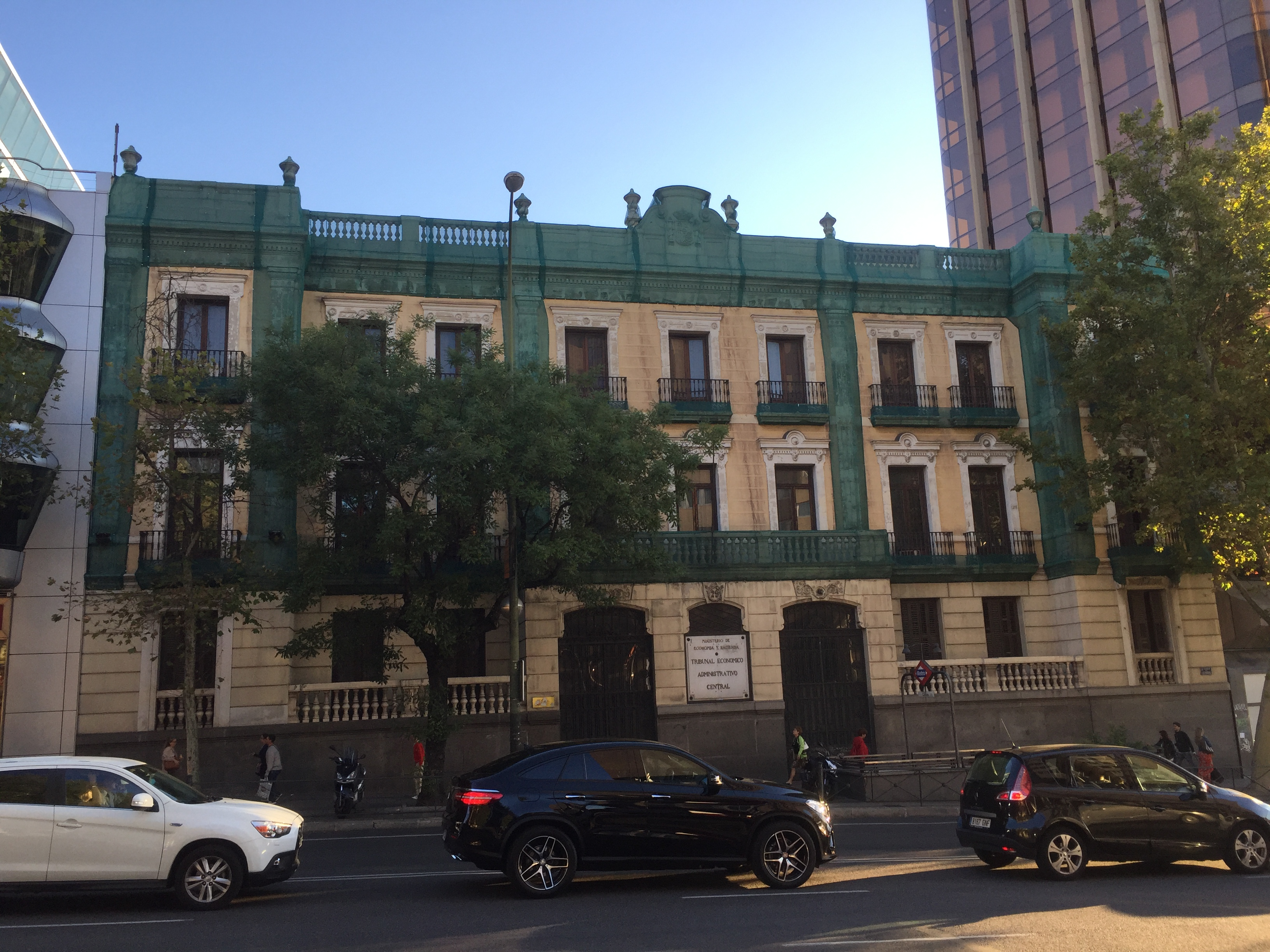 Palacio de Egaña, Génova 29 (Madrid) del arquitecto Ricardo Rodrigo